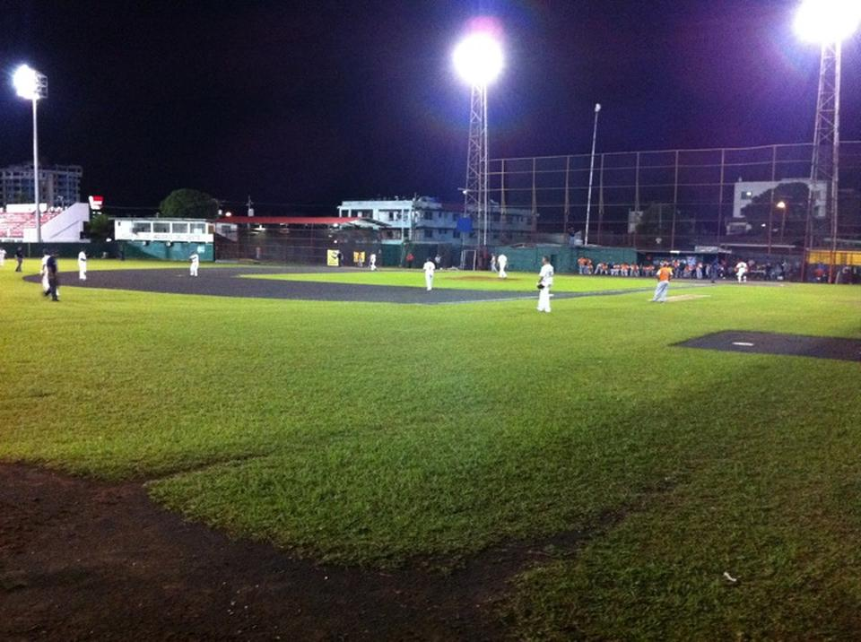 Estadio de Béisbol Justino Gato Brujo Salinas, La Chorrera, Panamá